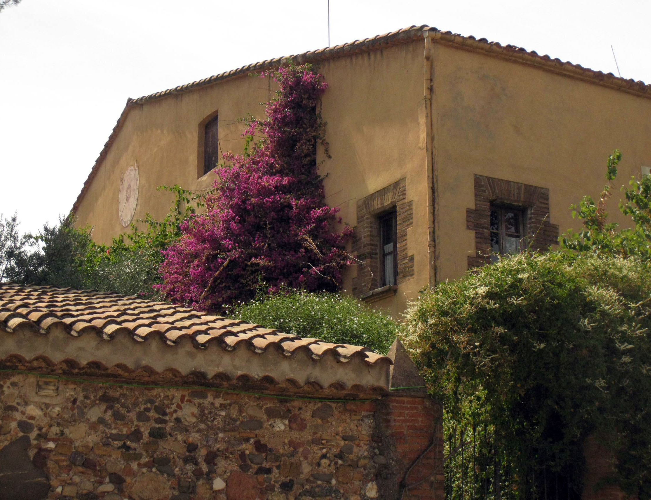 Can Palet de la Quadra de Vallparadís (Terrassa)